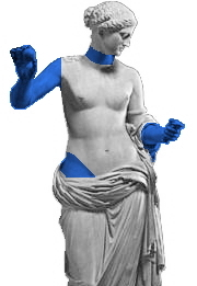 Vénus d'Arles (Le louvre) - schéma de restauration par Girardon